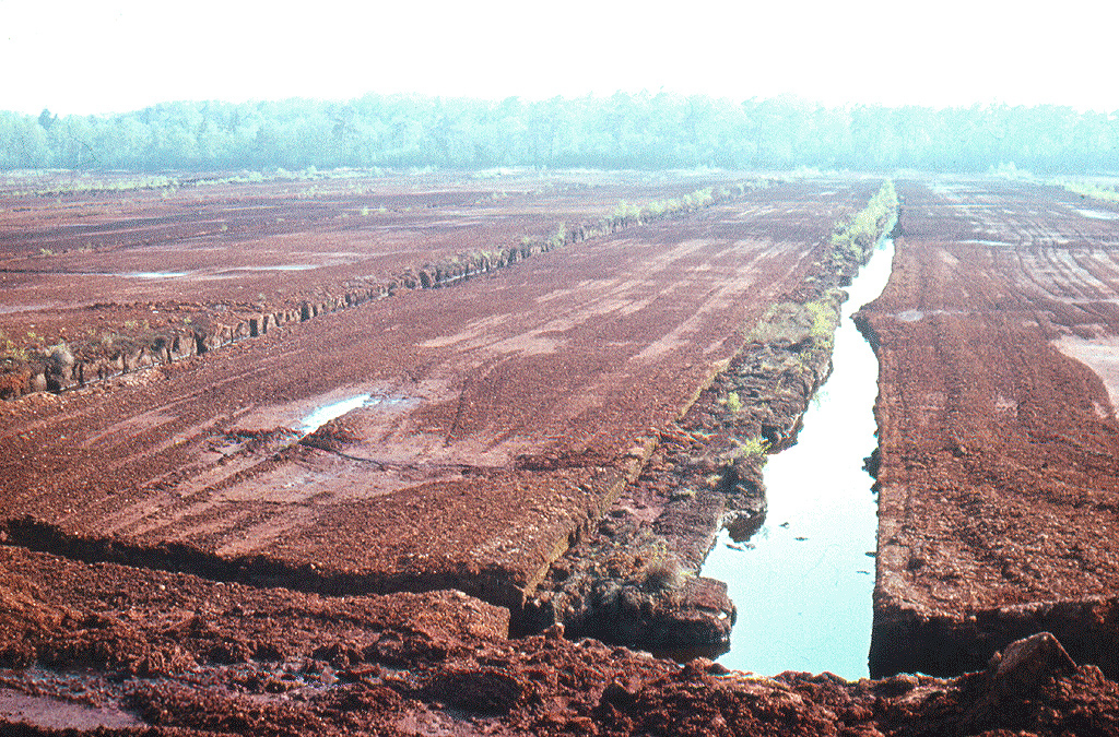 Entwässerungsgräben im Woitendorfer Moor bei Gadebusch (Mecklenburg-Vorpommern)